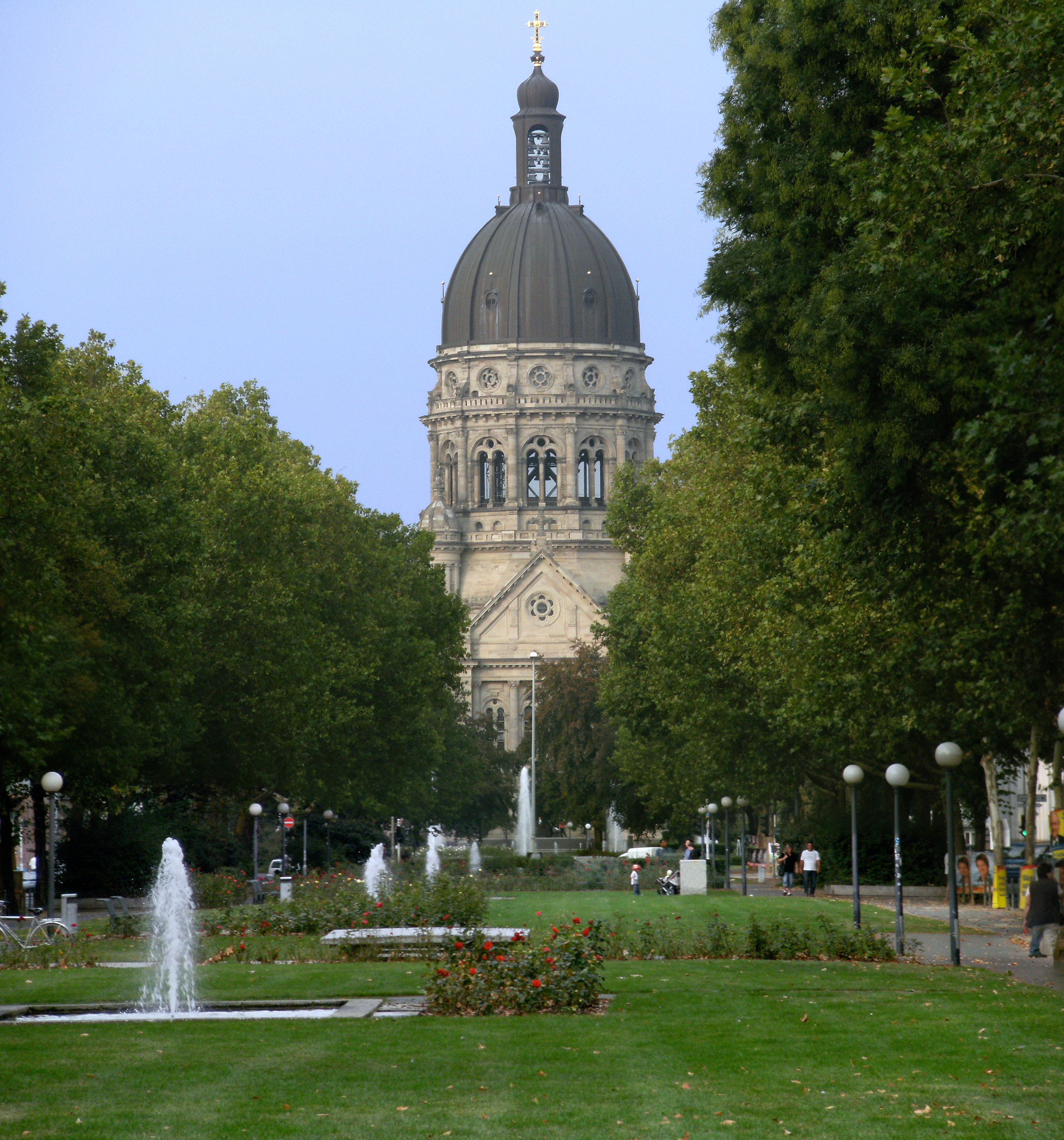 Park auf der Kaiserstraße mit der Christuskirche am Ende. Stiched mit Photoshop aus 3 Bildern.